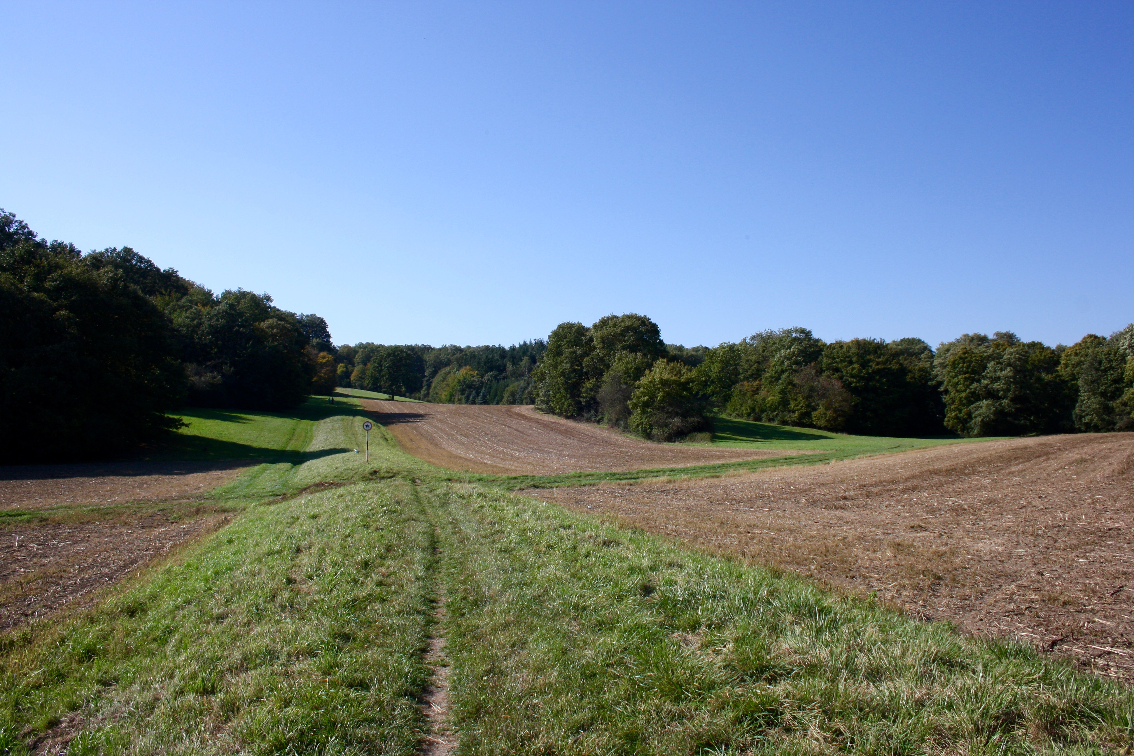 Trasse der II. Wiener Hochquellenwasserleitung am Tschogel südlich des Kaiserzipfs in Wien-Kalksburg.